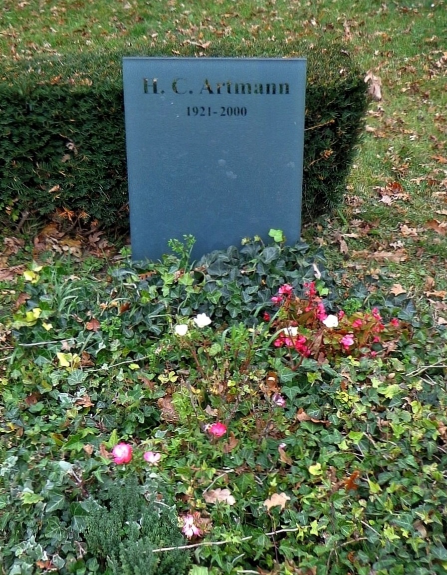 Feuerhalle Simmering - Abteilung 1 (Urnenhain, Erdgräber): Urnengrab von H.C. Artmann (Abteilung 1, Ring 1, Gruppe 2, Nummer 3)